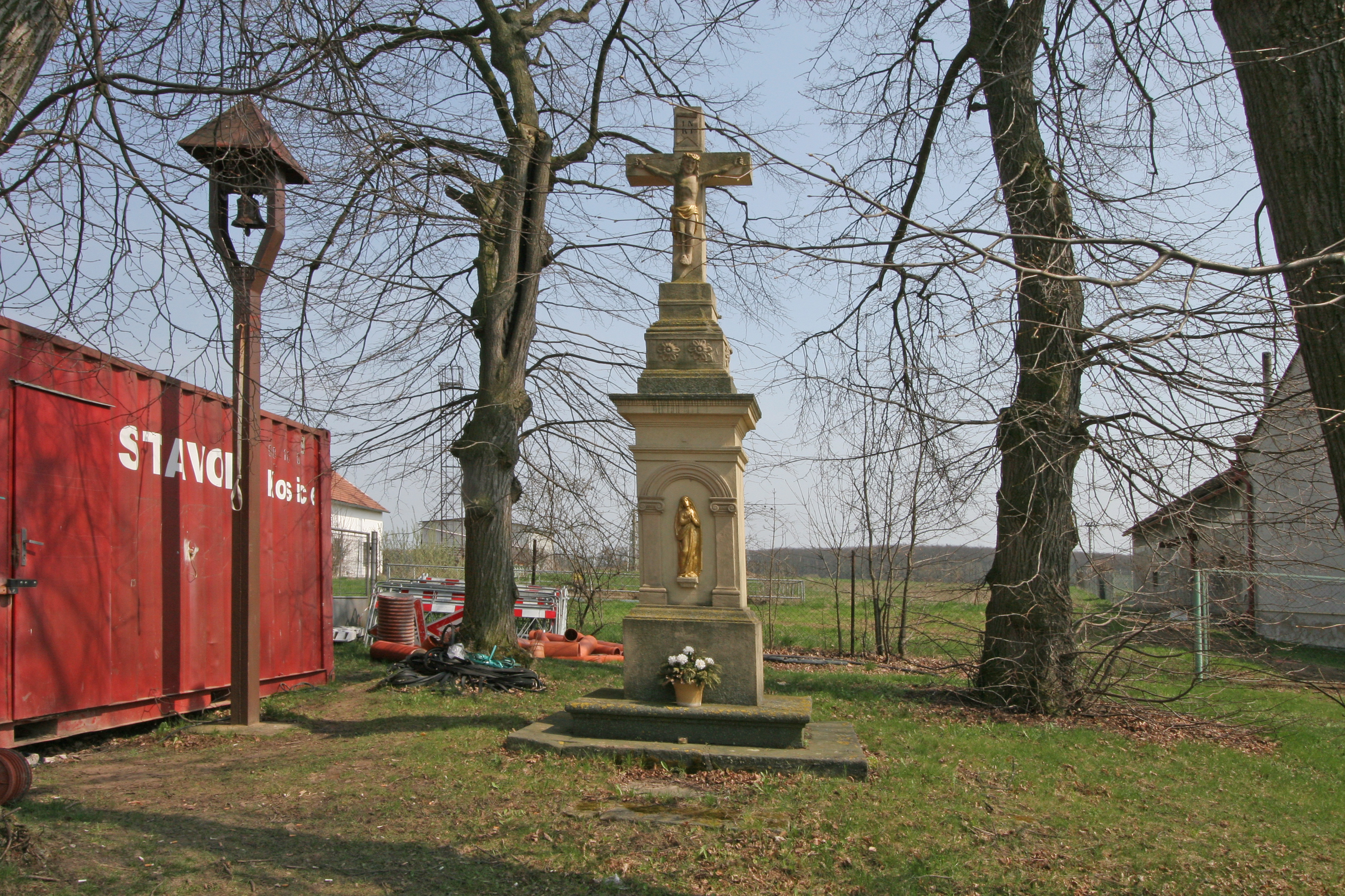 Káranice zvonička a křížek